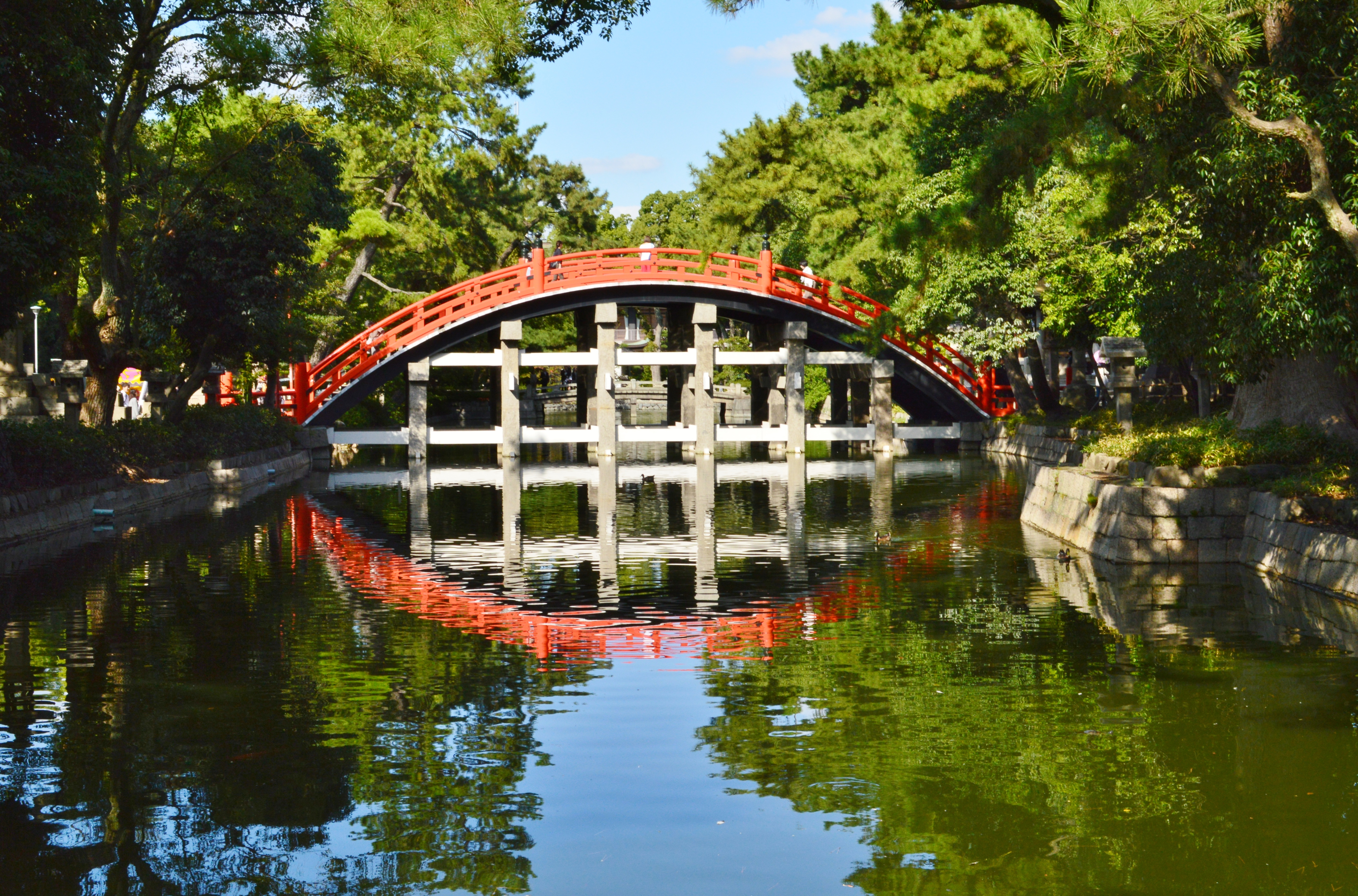 住吉大社 反橋